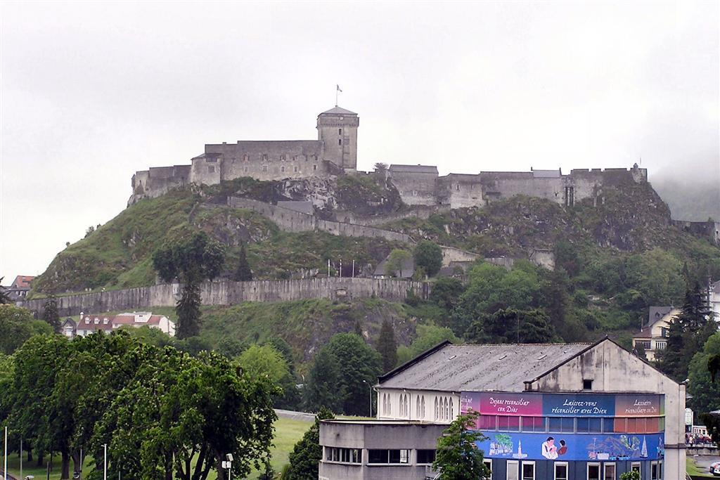 château fort de lourdes